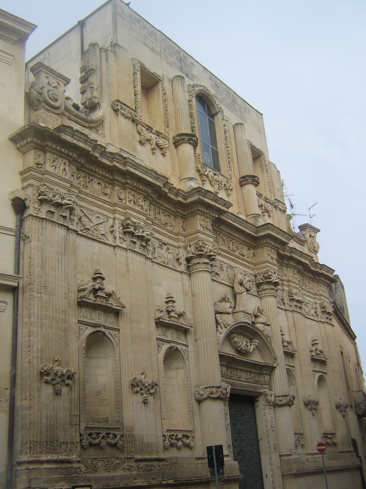 Sant’Angelo church in Lecce, Italy